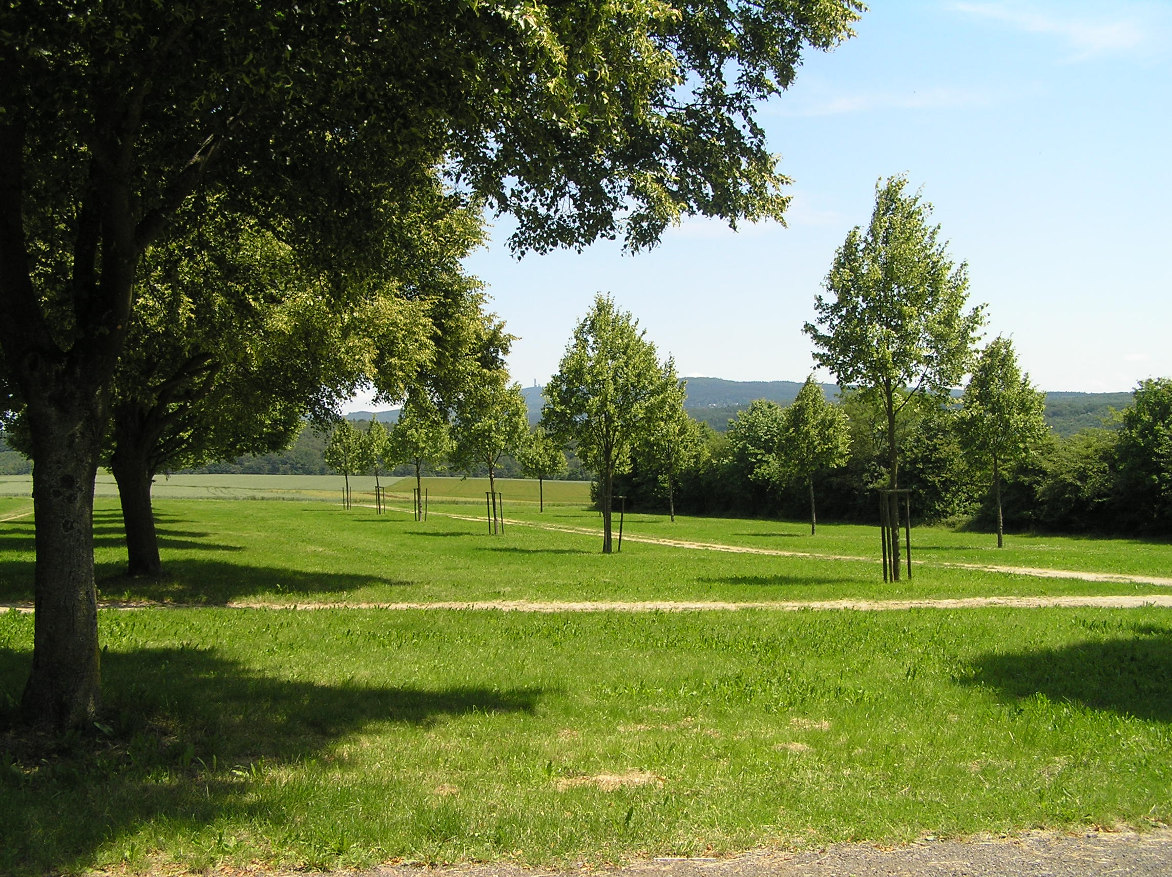 Marktgelände des Alteburger Marktes (außerhalb der Marktzeit). Früher lag hier das Kastell Alteburg